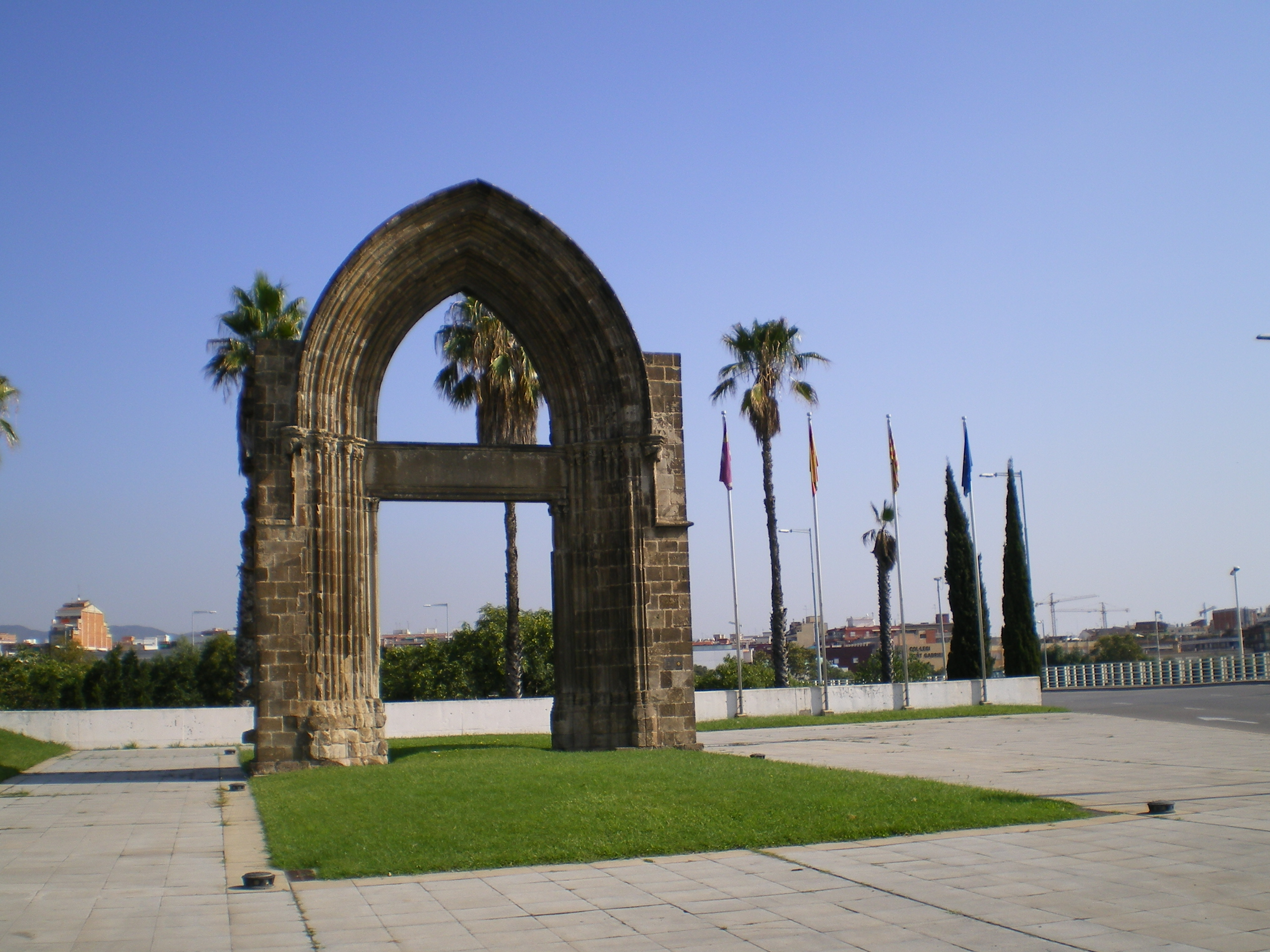 Arco de Sant Adrìa de Besòs